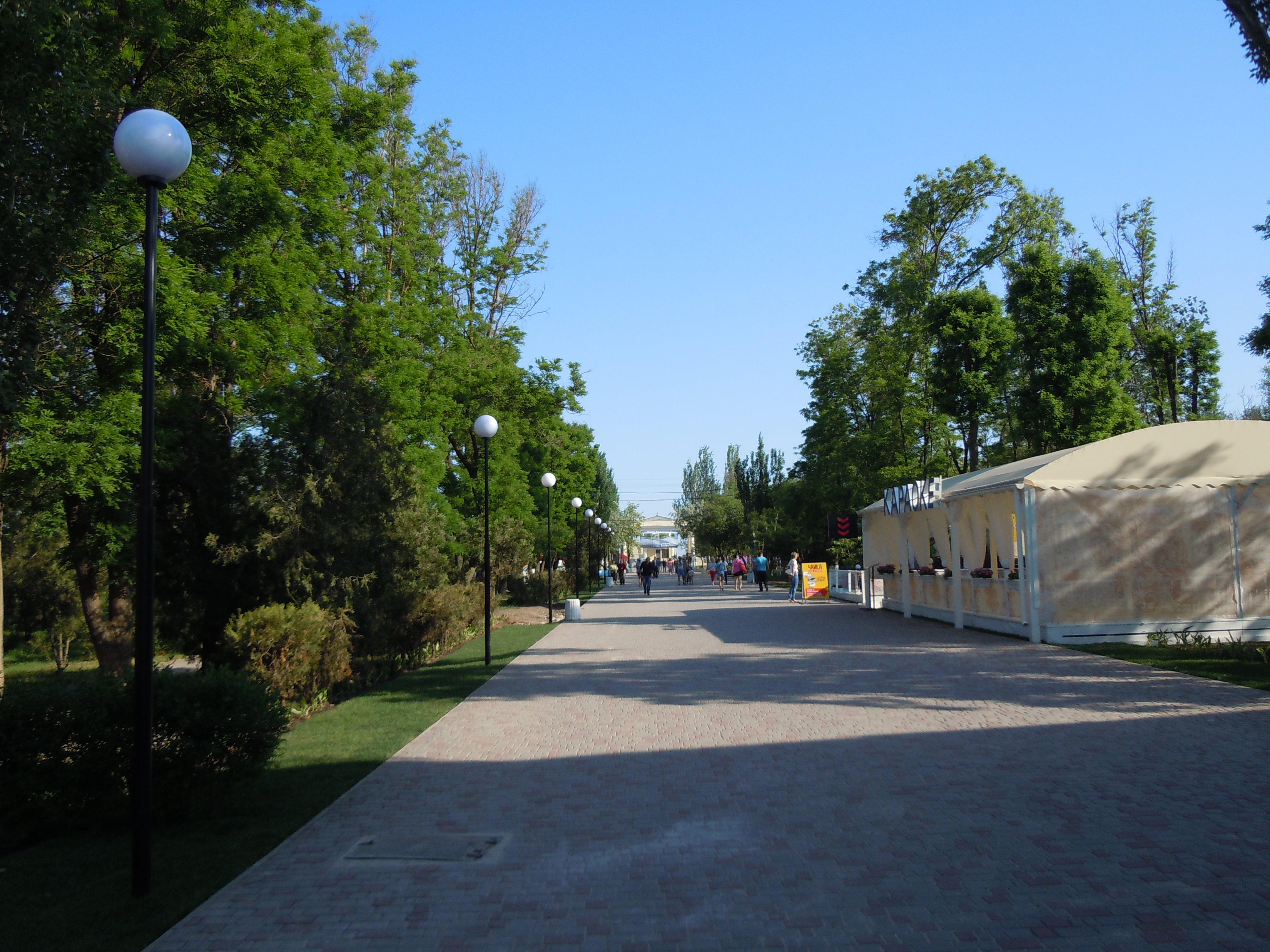 Гідропарк «Лузанівка», м. Одеса, Миколаївська дорога, 172 а